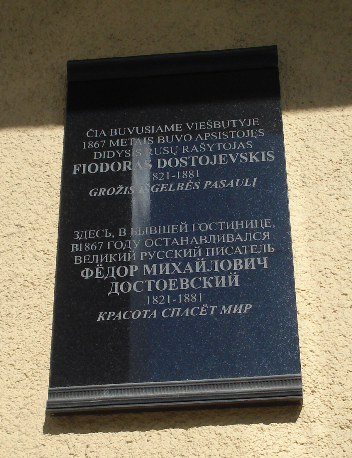 Fyodor Dostoyevsky memorial tablet in Vilnius